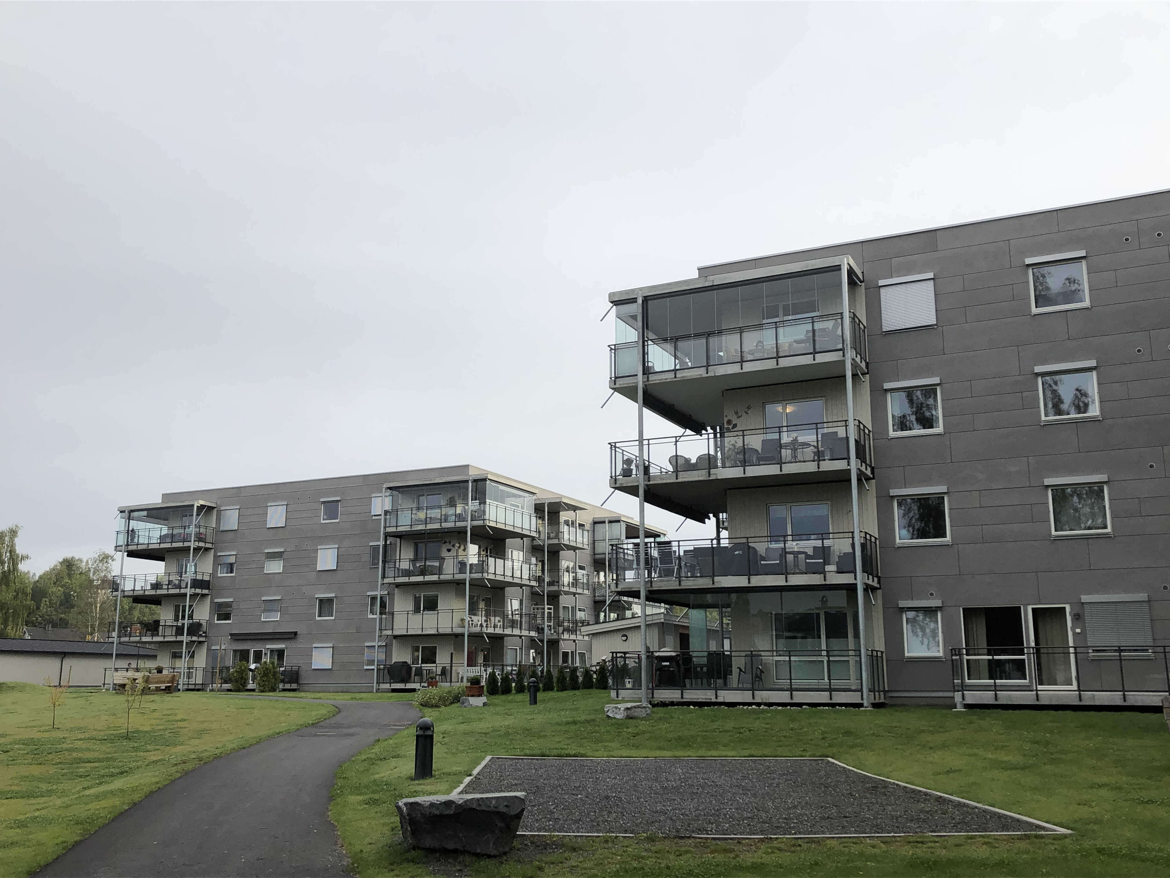 Lavblokker i Ankersgate 8 og 10.